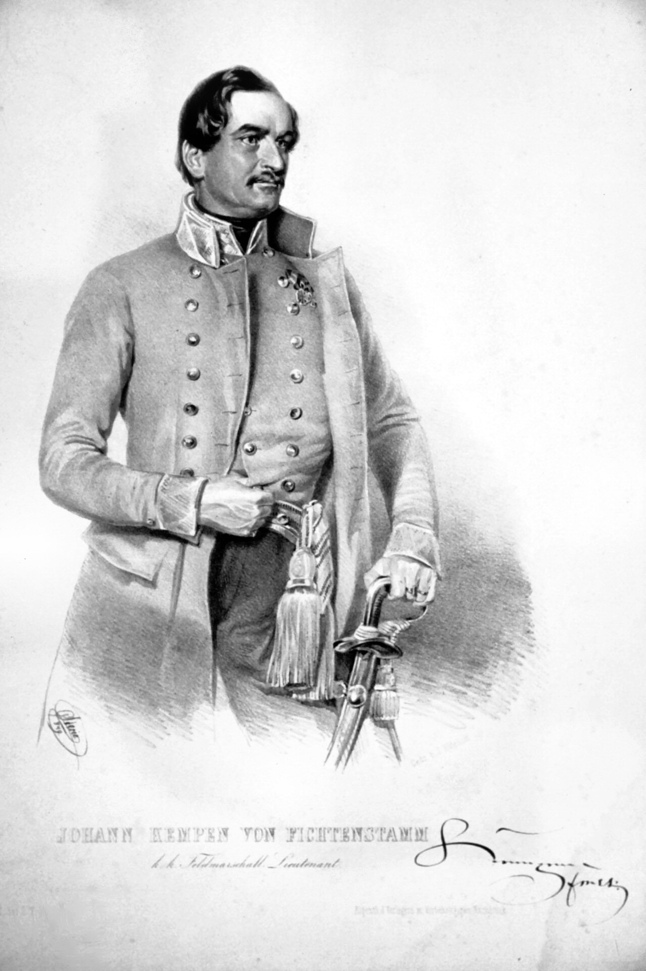 Portrait of Johann Franz Kempen von Fichtenstamm